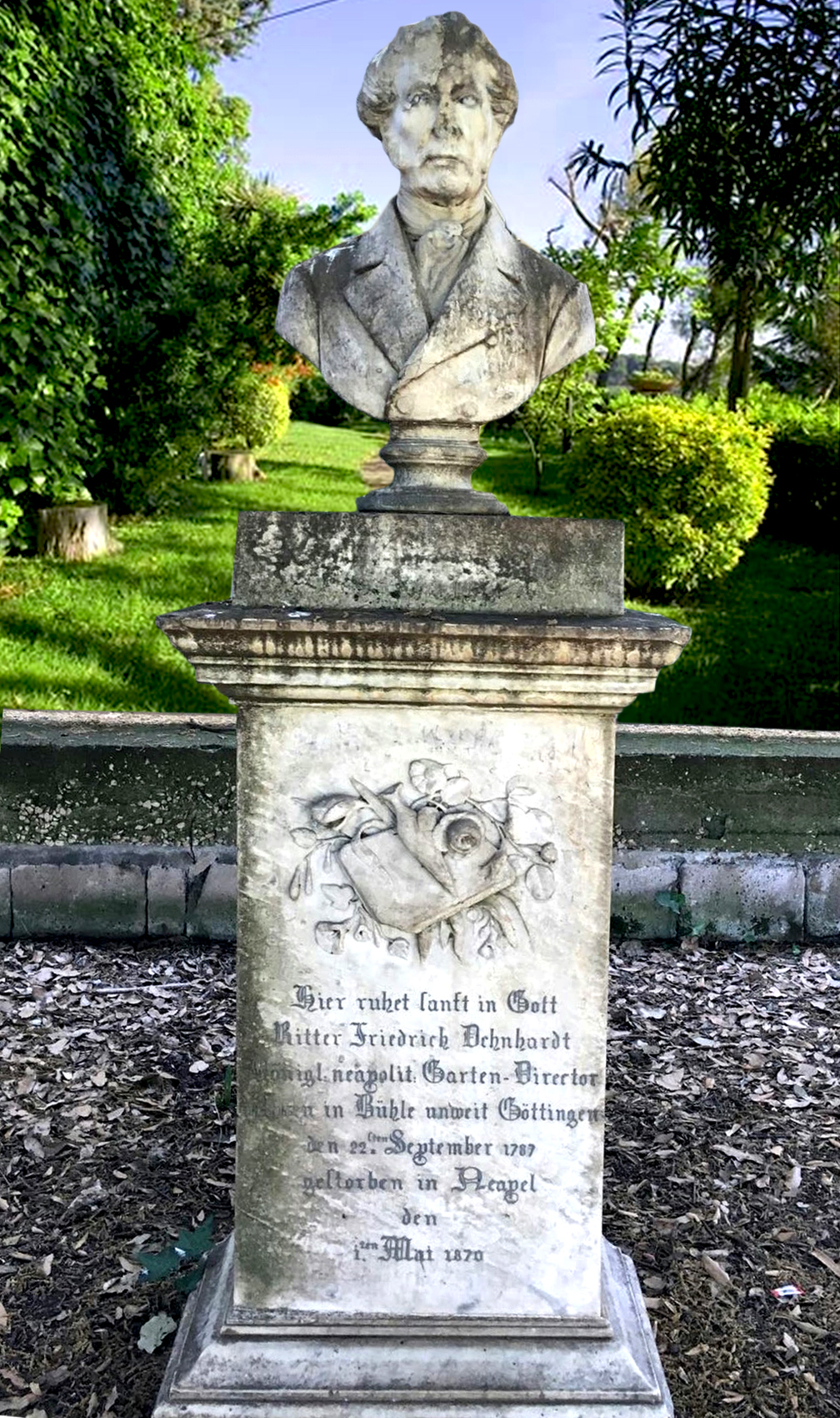 Busto del botanico tedesco Friedrich Dehnhardt